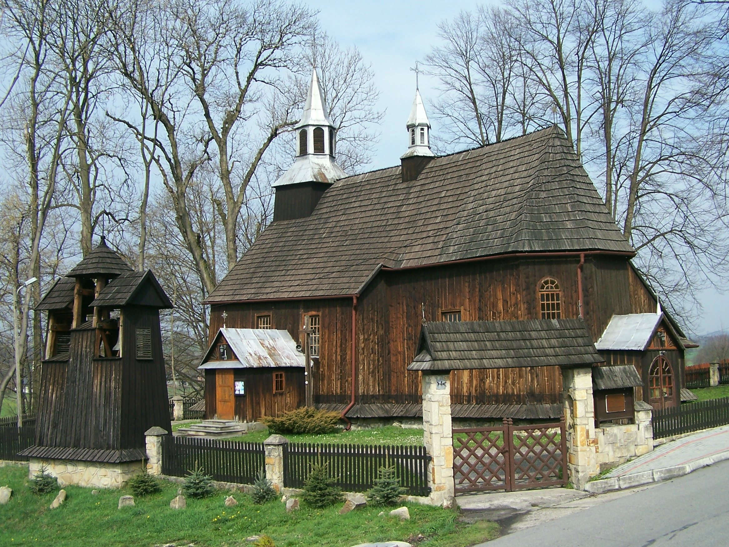 Chronów (woj. małopolskie)